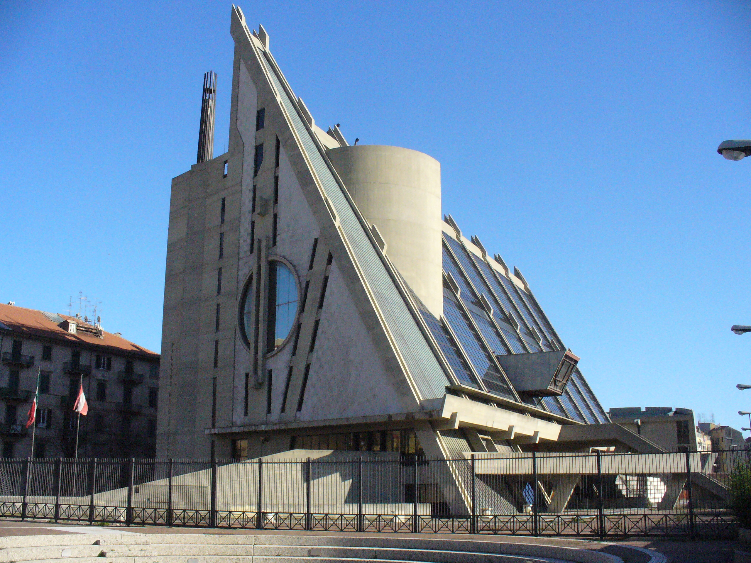 Palazzo di Giustizia di Savona in Piazza del Popolo, opera dell'architetto Leonardo Ricci